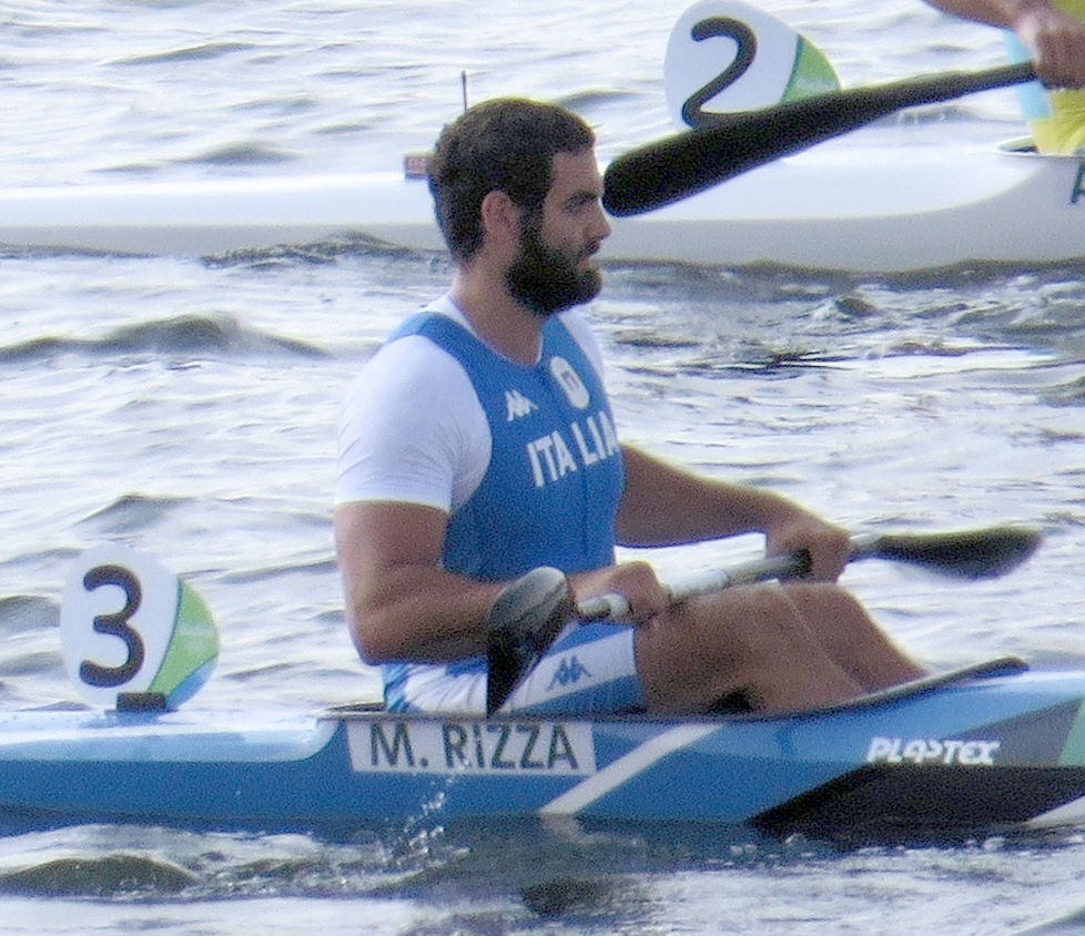 Rio 2016. Canoagem de velocidade.sx 03